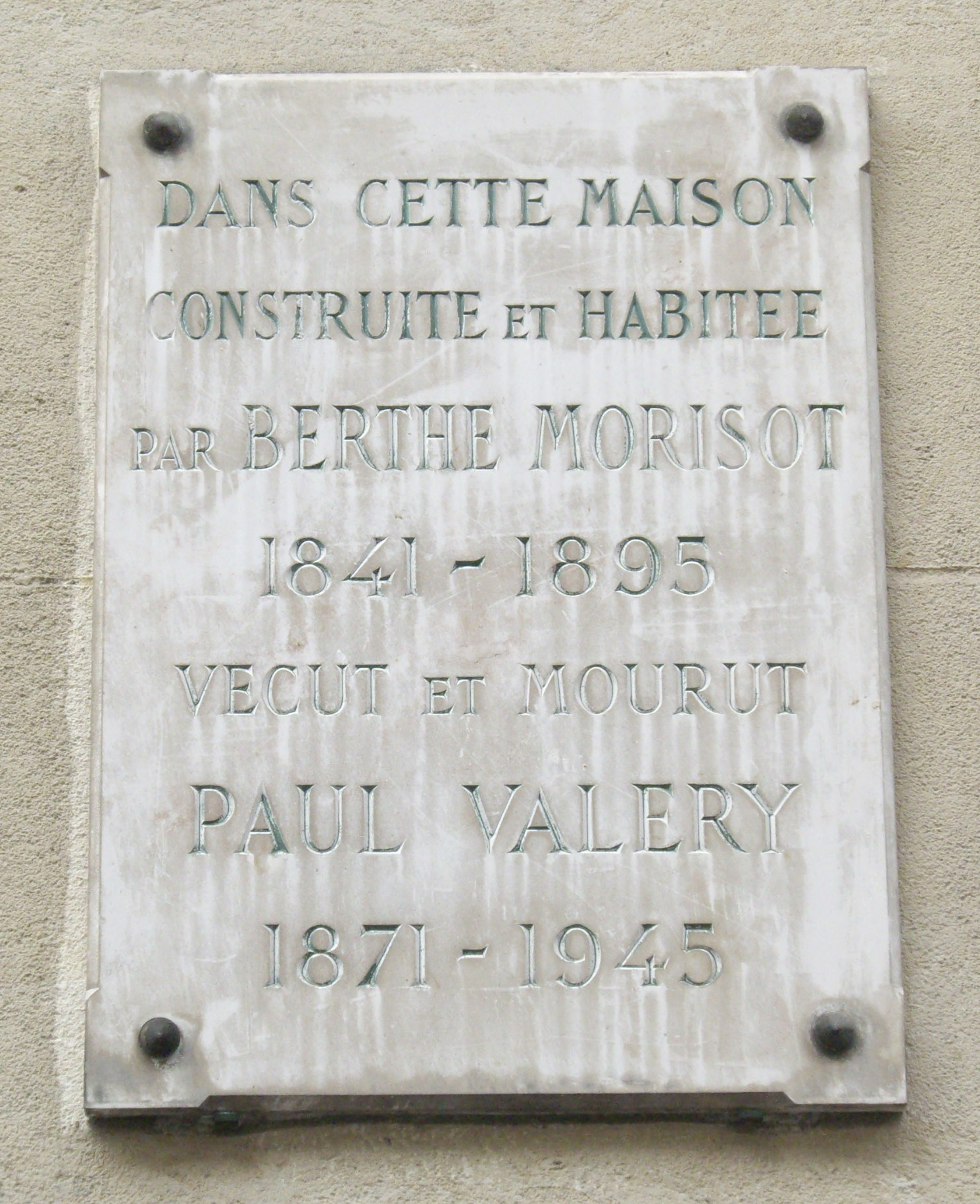 Plaque commémorative, 40 rue Paul Valéry, Paris 16e. « Dans cette maison construite et habitée par Berthe Morisot, 1841-1895, vécut et mourut Paul Valéry, 1871-1945. »